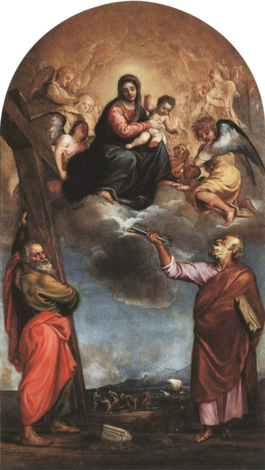 Pala d'altare del Duomo di Serravalle